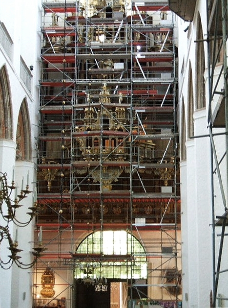 Stralsund, Stellwagen-Orgel in der Marienkirche